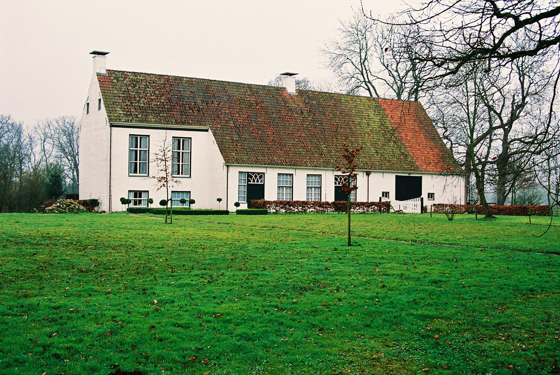 De Iwemastins te Niebert.